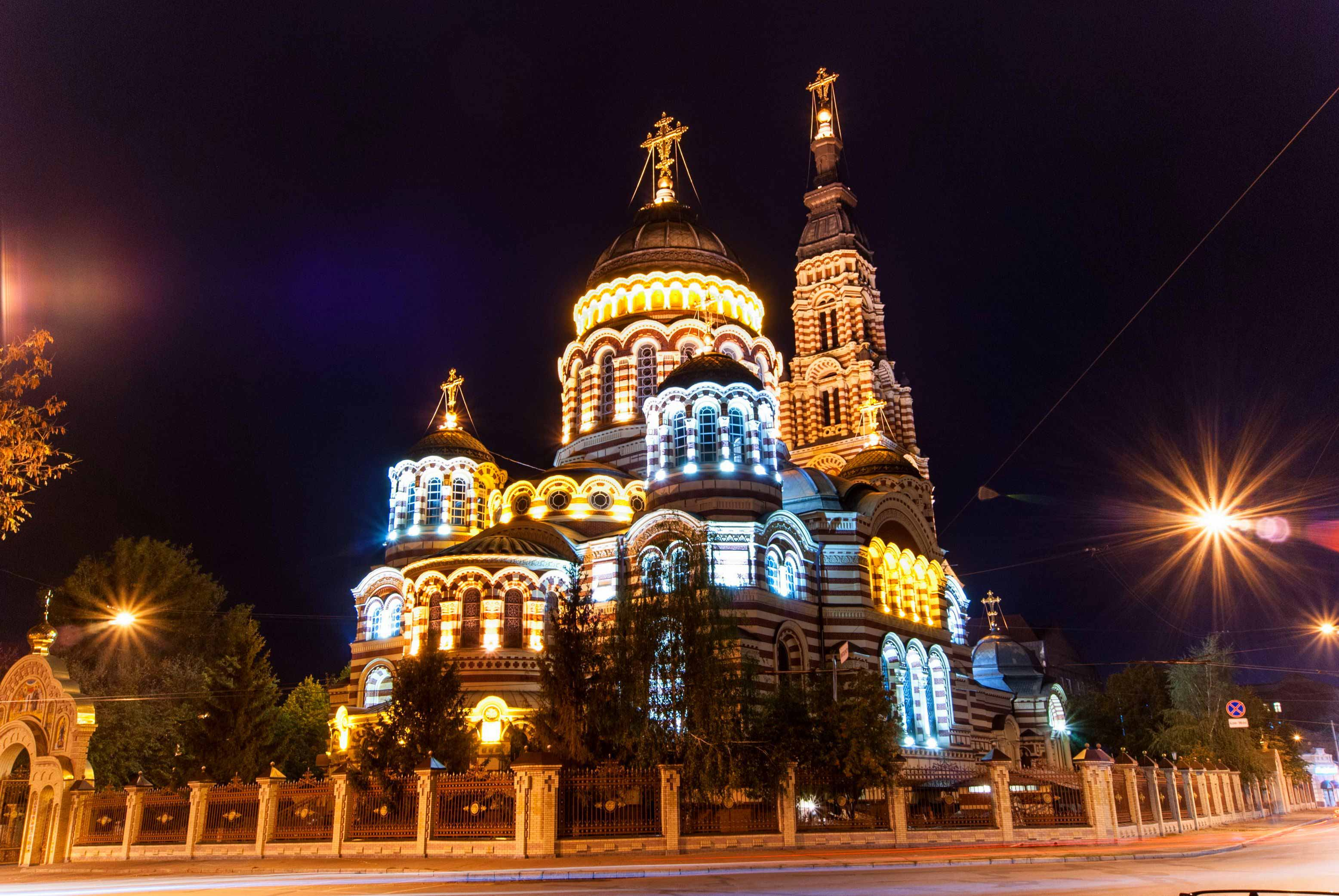 Catedral de la Anunciación